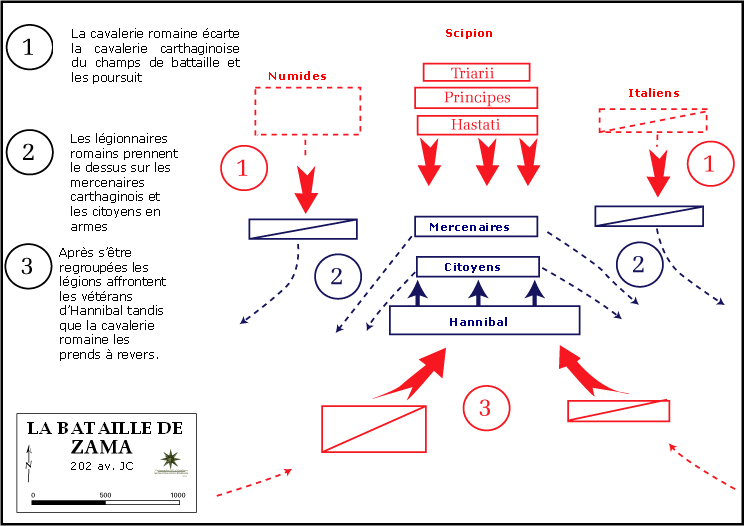 Plan de la bataille de ZAMA. Cette image est la traduction de celle de wikipédia en. Elle est dans le domaine public.